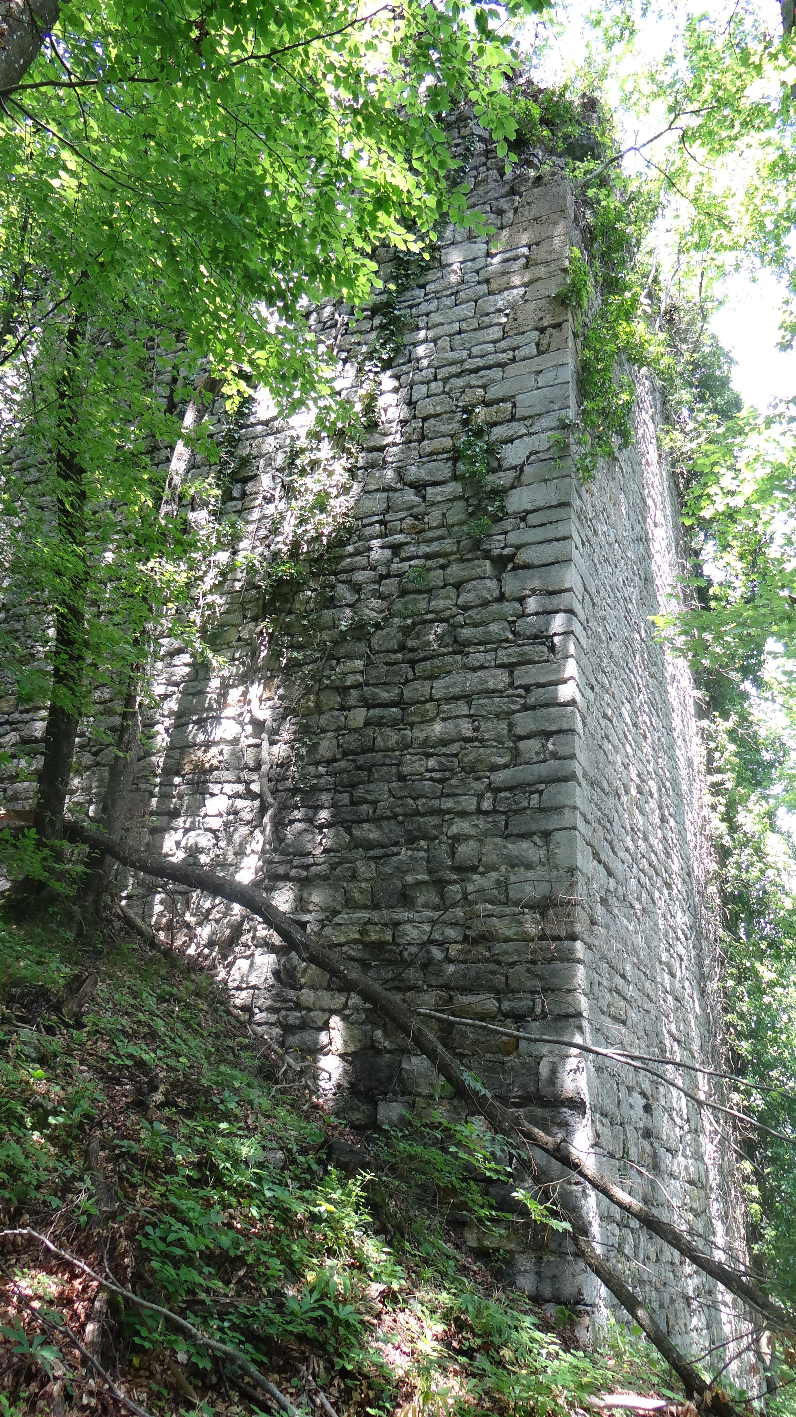 Stolp Čretež IV. 2013